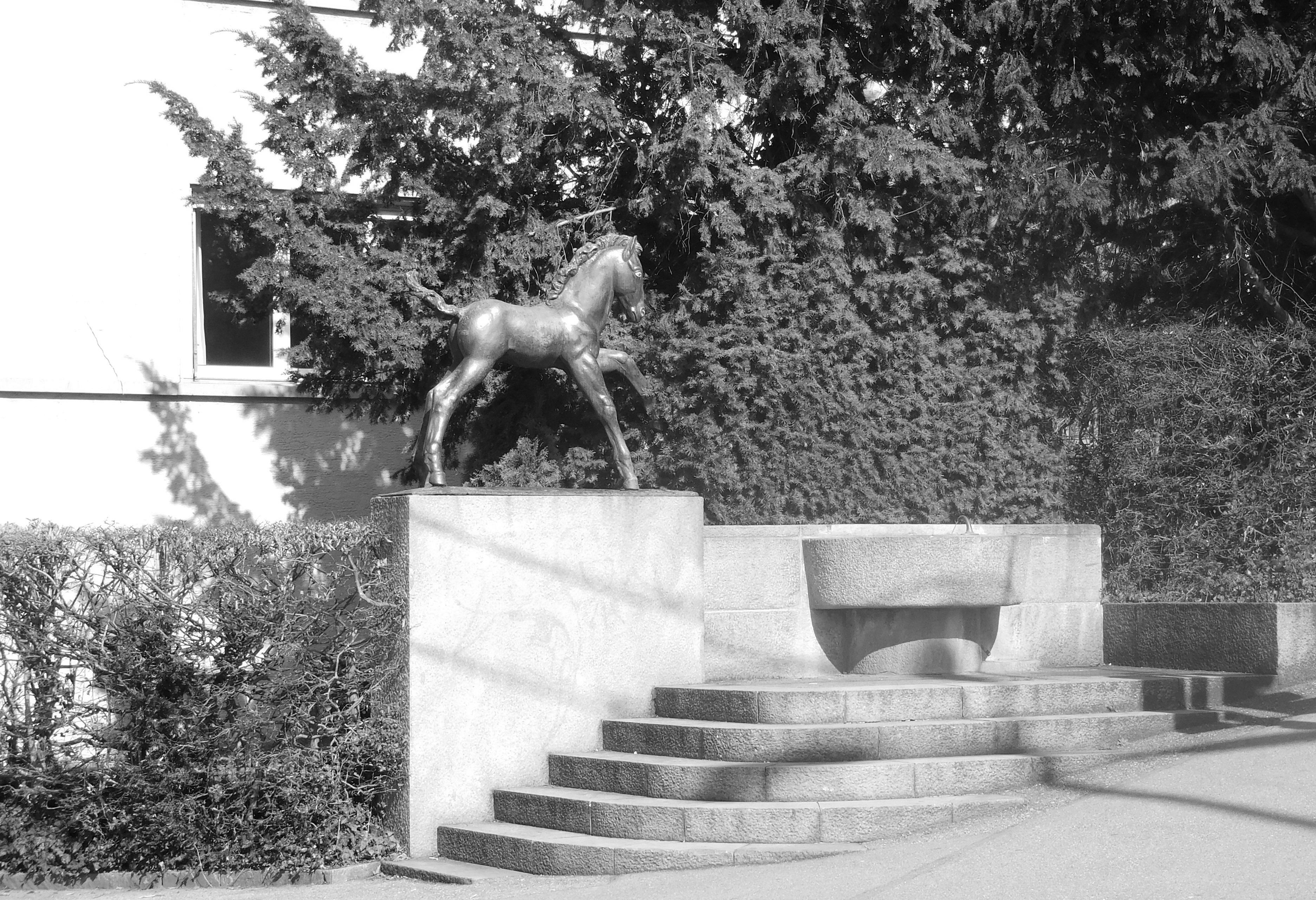 Werner F. Kunz (1896-1981): Fohlenbrunnen (1935, Bronze) in Zürich-Fluntern, Gladbach-/Kraftstrasse bei der Kirche Fluntern